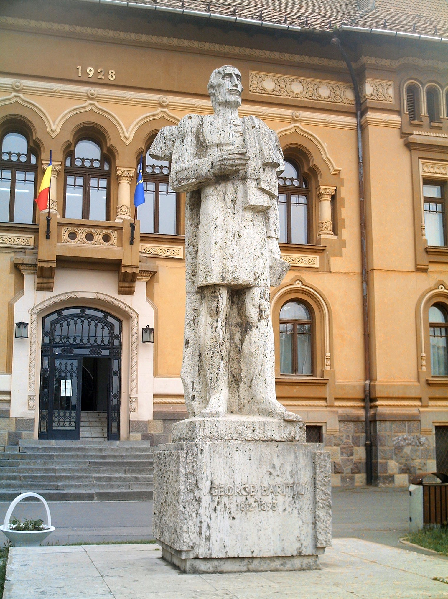 George Bariţ